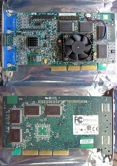 Dieses Bild zeigt eine Matrox G400 Max - 32 MB / Vorder und Rückseite / Grafikkarte.